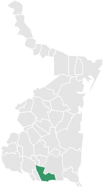 Municipio de El Mante Tamaulipas, México